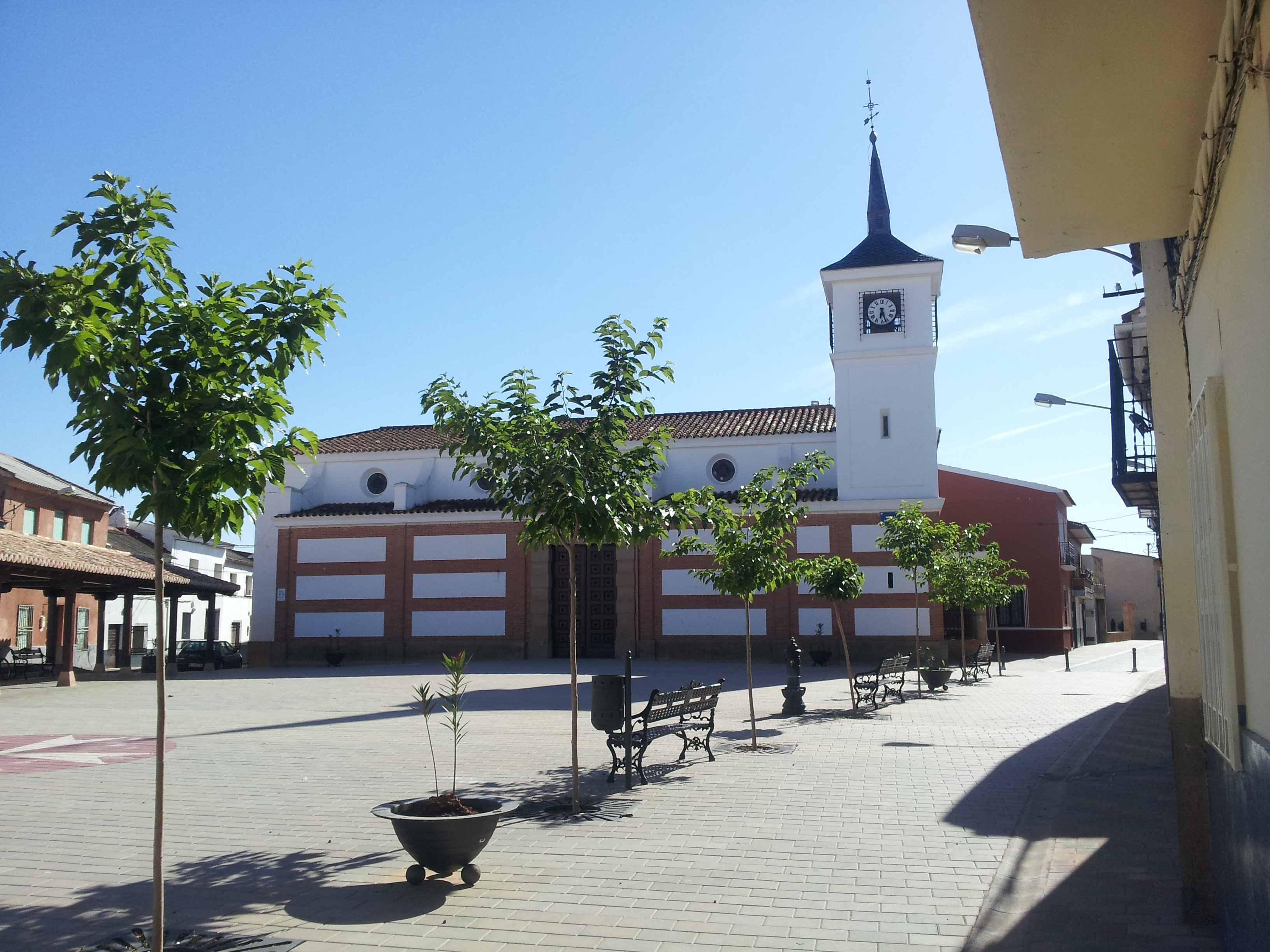 Plaza Mayor e Iglesia de San Carlos Borromeo en Las Labores, Provincia de Ciudad Real